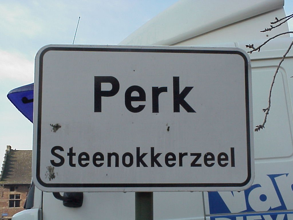 Zelf gemaakt